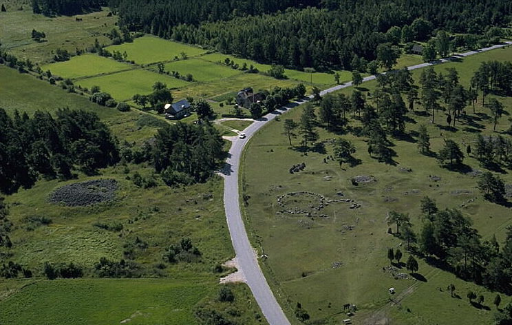 Röset till vänster i bilden. Motiv: Digerrojr Nyckelord: Flygbilder, Riksintressen Kategori: Grav- och boplatsområde Röset till vänster i bilden.